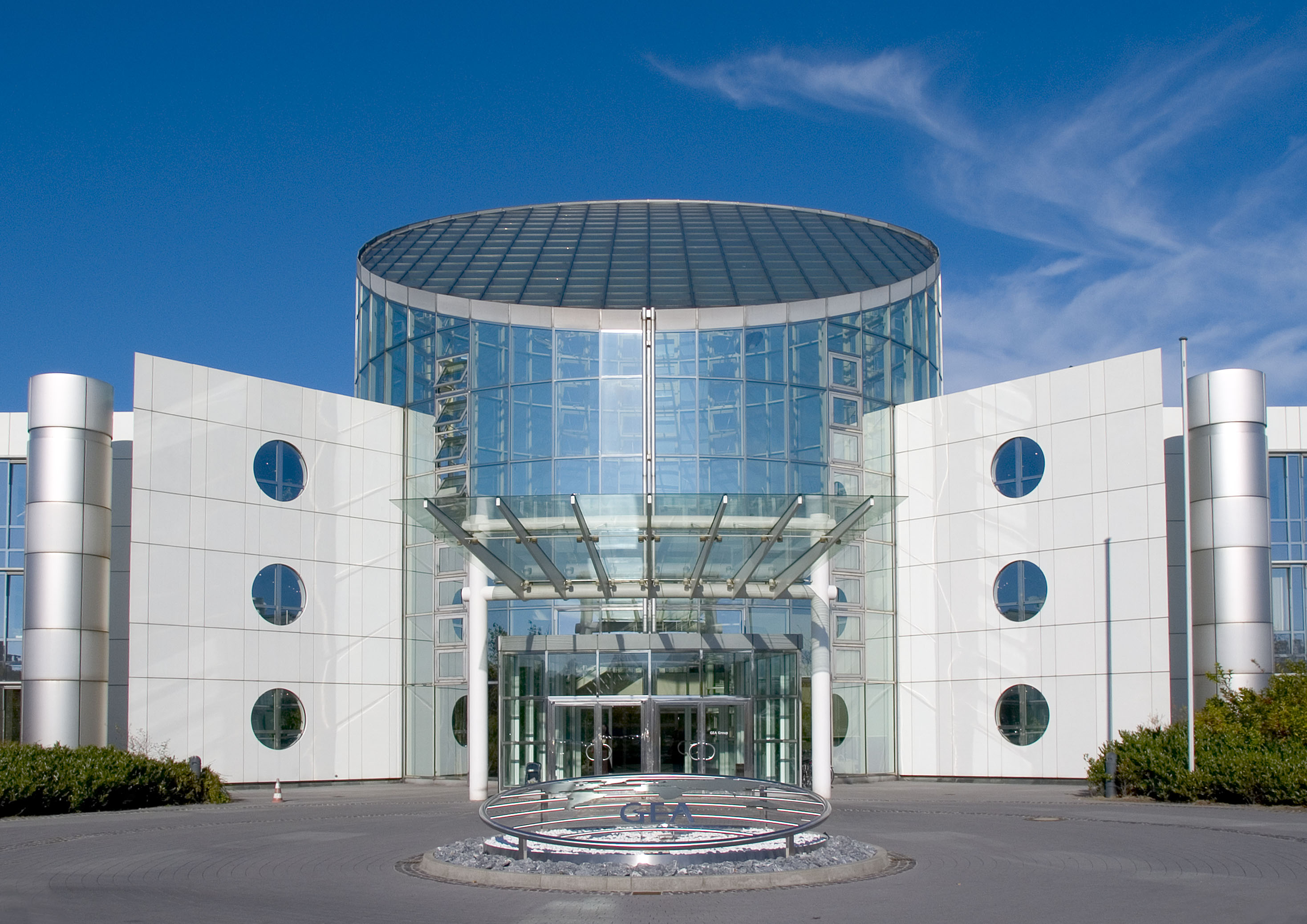 Das ehemalige GEA Center Bochum, Germany